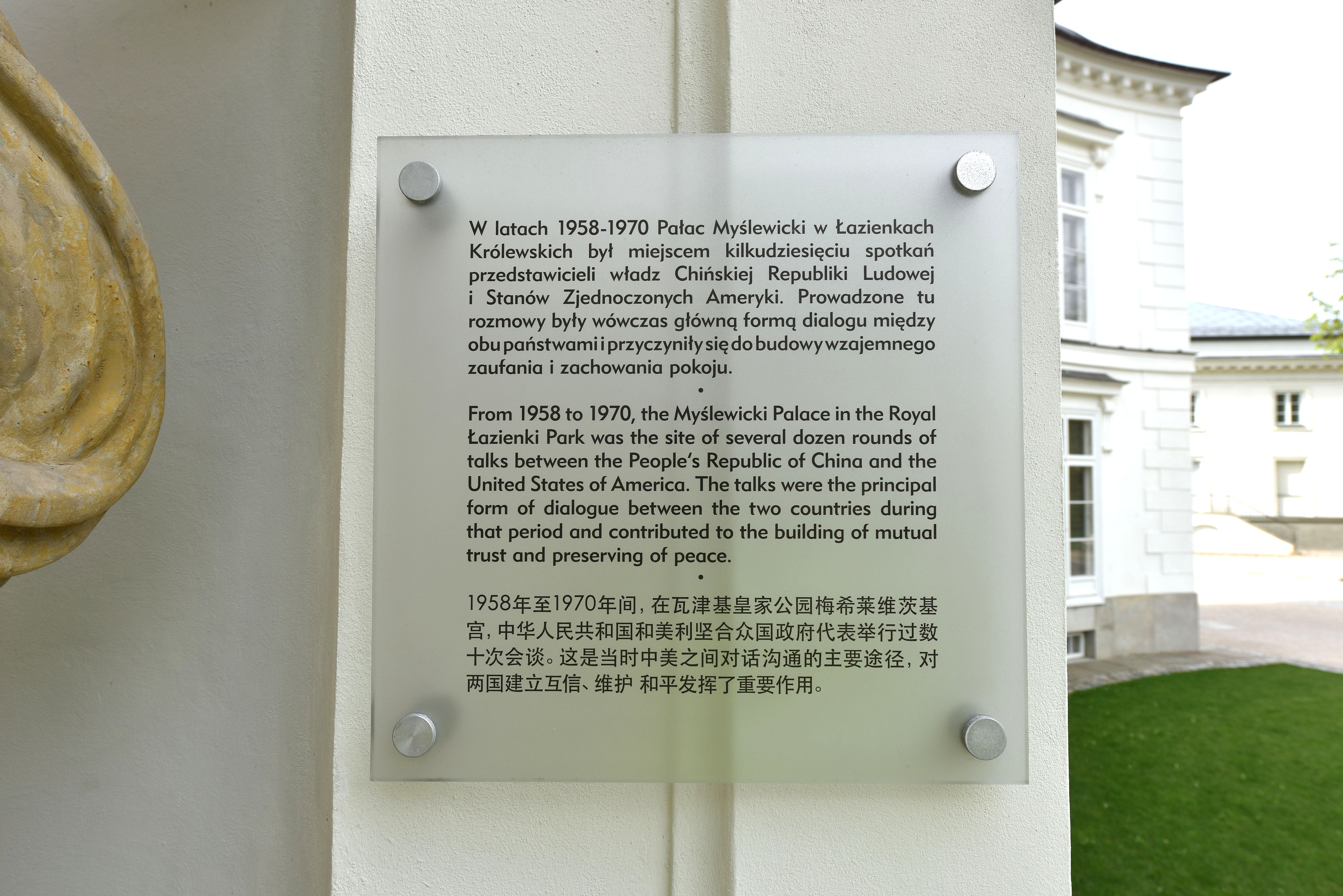 Tablica przy wejściu do pałacu Myślewickiego w Łazienkach Królewskich w Warszawie